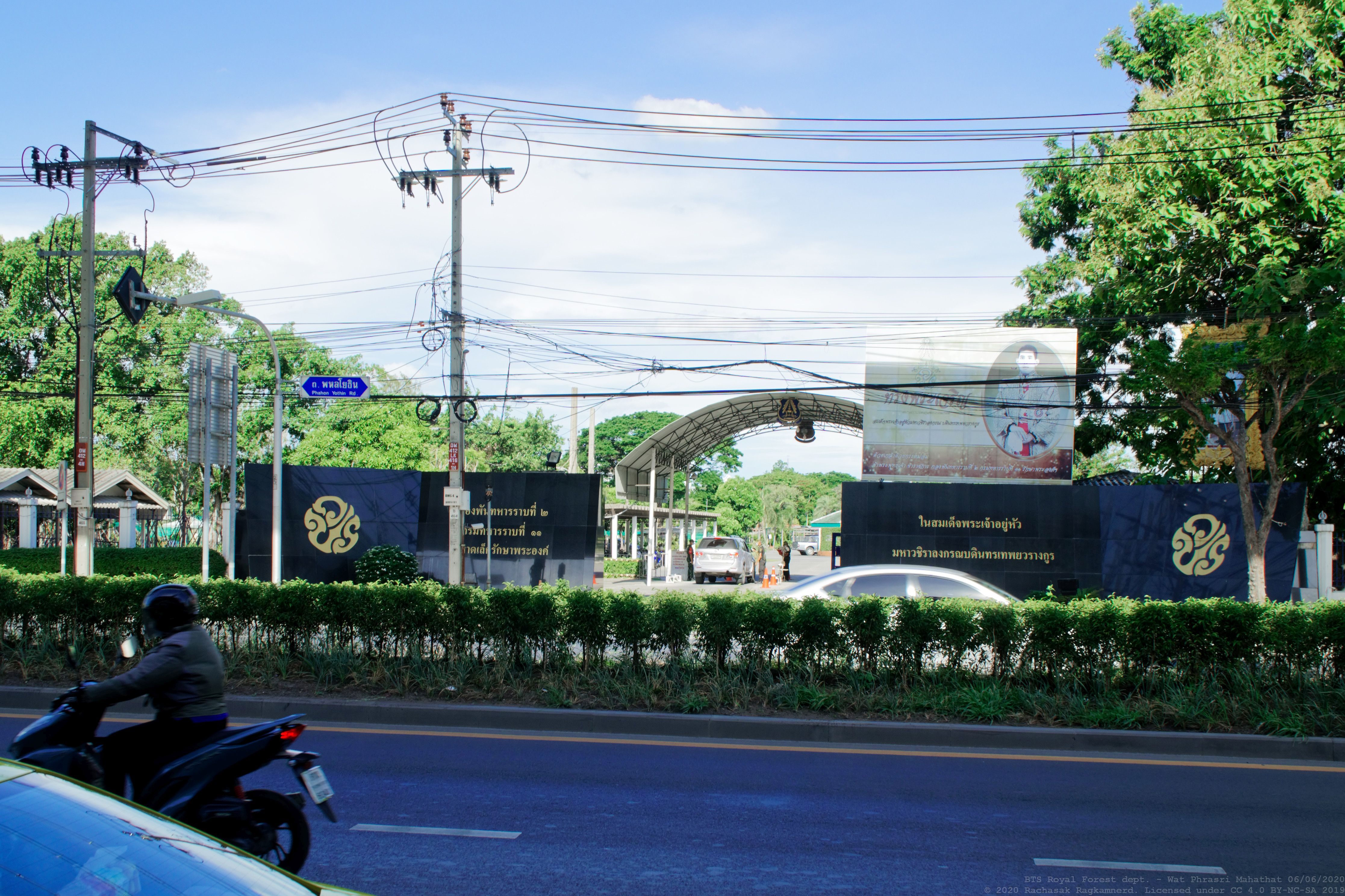 กองพันทหารราบที่ 2 กรมทหารราบที่ 11